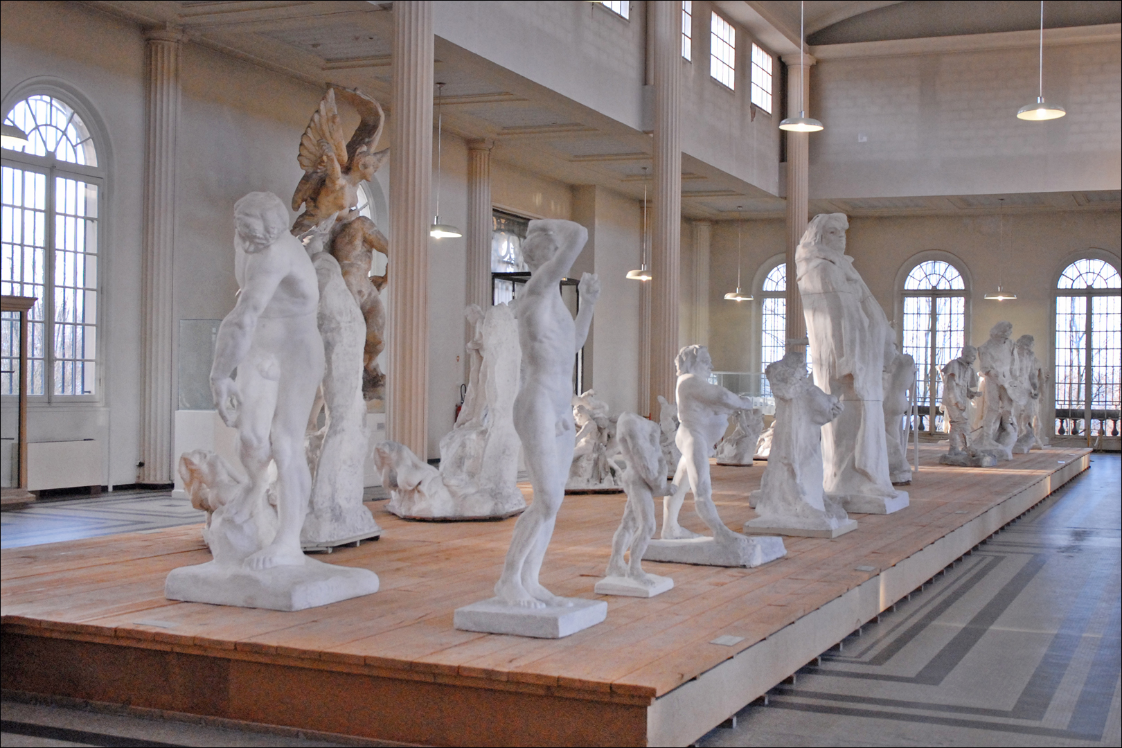 Les plâtres d'Auguste Rodin exposés à Meudon. Dès 1893, Auguste Rodin s'installe dans la villa des Brillants (sur une colline à Meudon, une ville proche de Paris et dans un zone de carrière). Il y habite avec son amie Rose Beuret qu'il n'épousera que peu de temps avant leur mort à tous deux, la même année 1917, à quelques mois d'intervalle. En contrebas du terrain, il fait reconstruire le fronton et une partie de la façade du château d'Issy, sans rien autour. Depuis 1948, ces éléments d'architecture ont été adossés à un bâtiment servant de musée (photo). Le musée Rodin de Meudon n'est composé que d'une seule salle dans laquelle sont présentées de nombreuses épreuves de ses oeuvres réalisées en plâtre et sur lesquelles il poursuivait ses recherches plastiques.